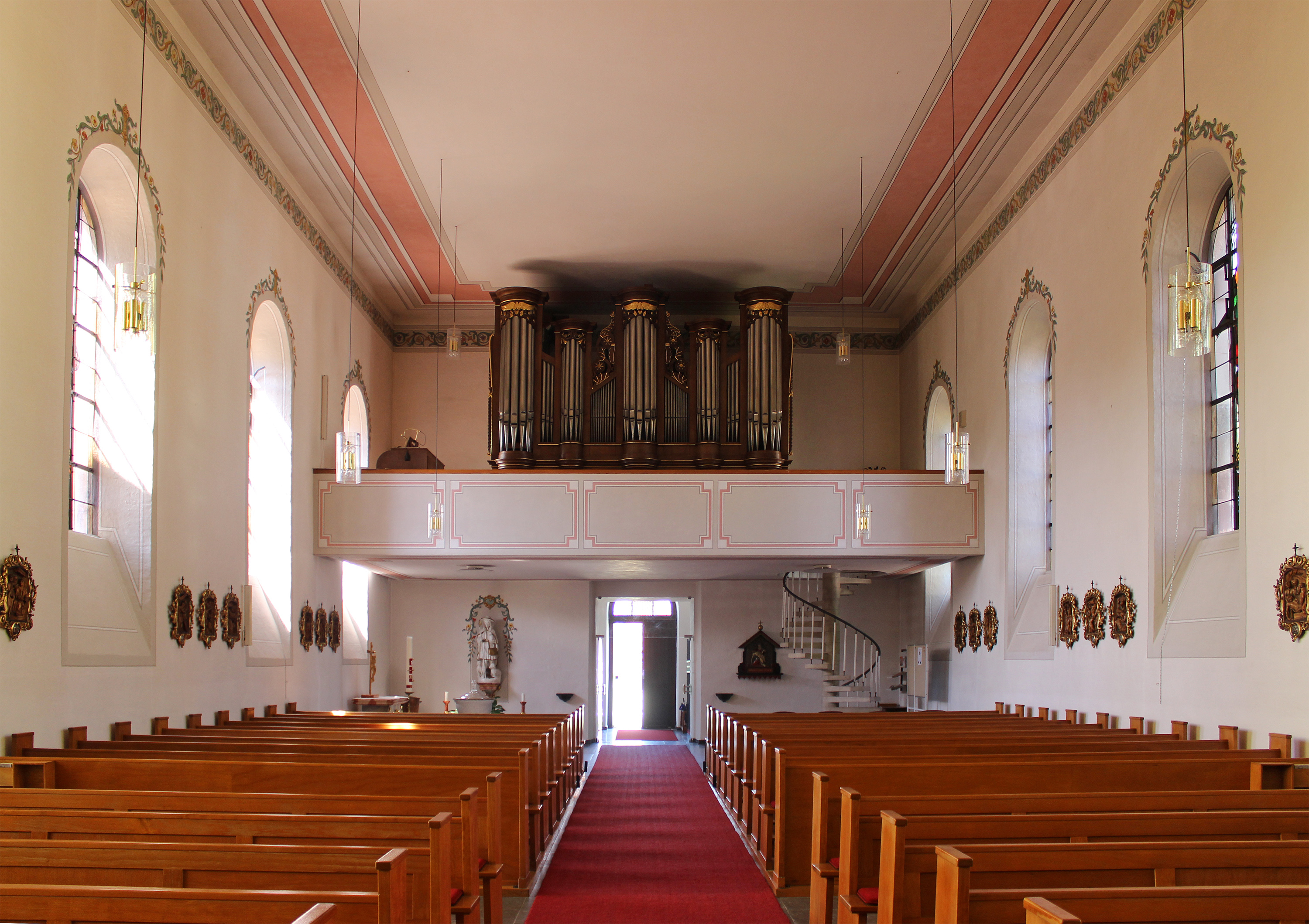 Blick ins Innere der katholischen Pfarrkirche St. Remigius, Freisen, Landkreis St. Wendel, Saarland